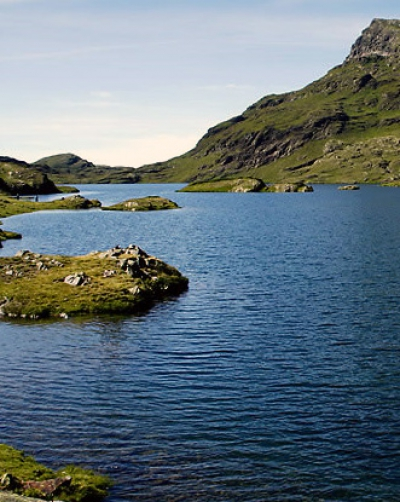 Vista del Estanh Long de Liat